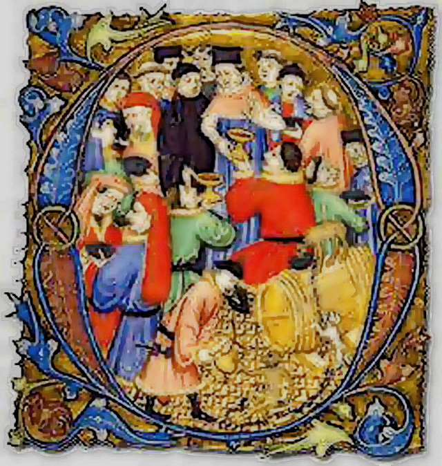 Moines, nobles et bourgeois dégustant